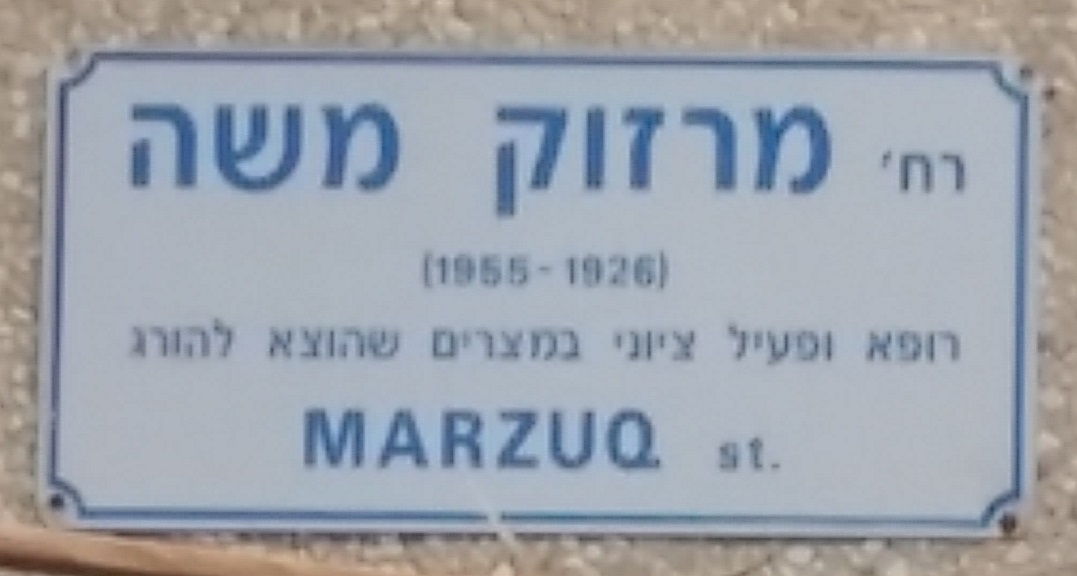 רחוב משה מרזוק, יד התשעה, הרצליה